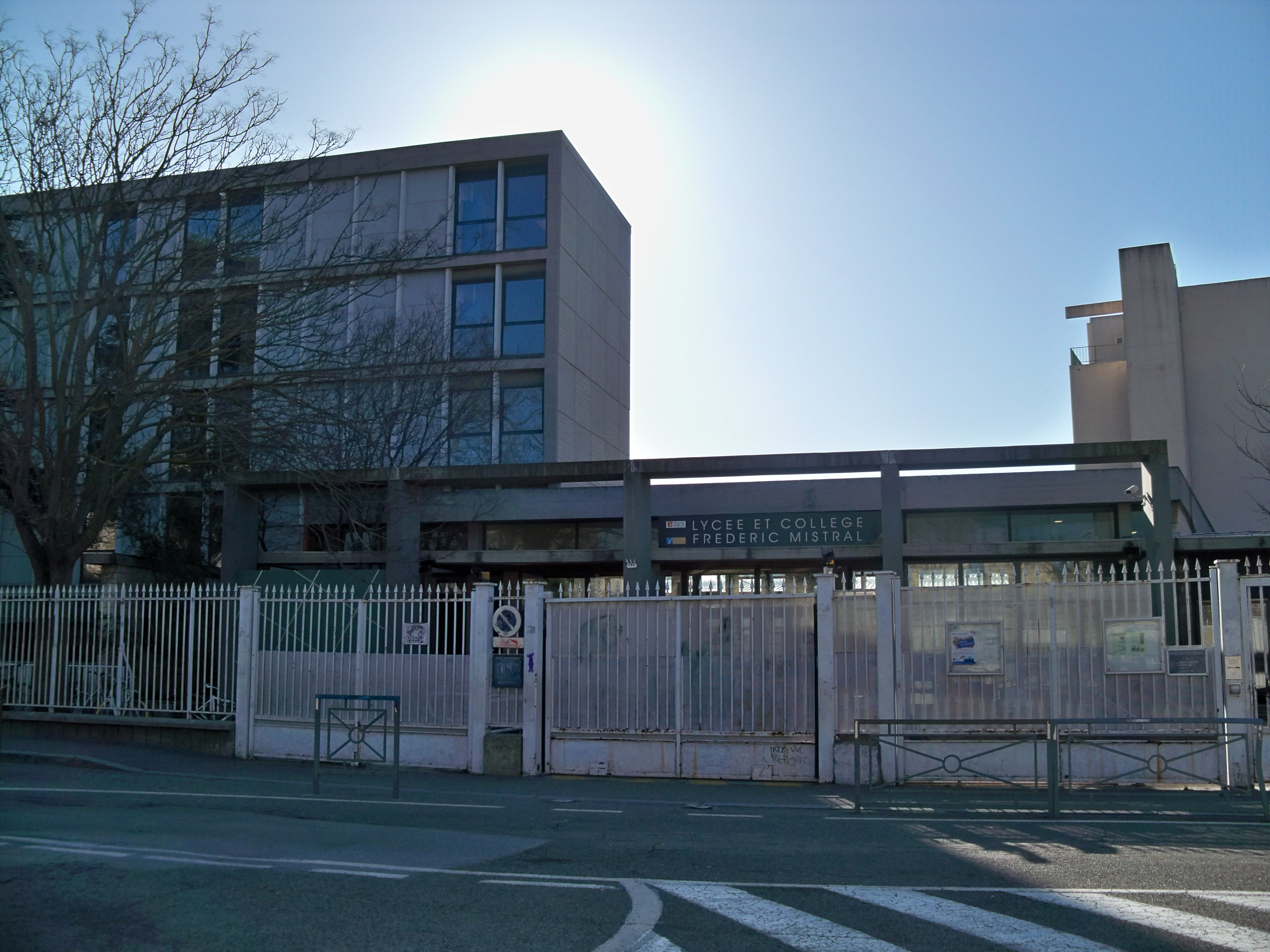 entrée du lycée Frédéric Mistral à Avignon